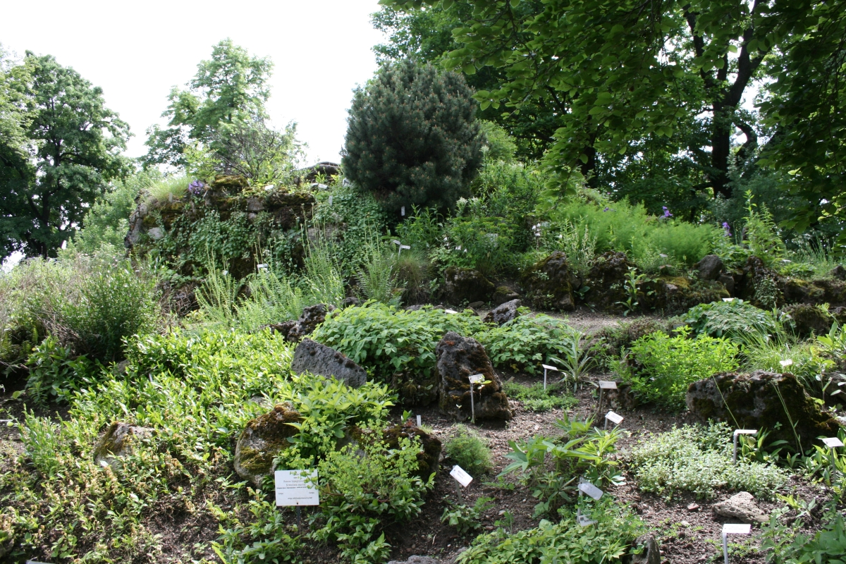 Kamenjar, snimljeno u Botaničkom vrtu u Zagrebu.